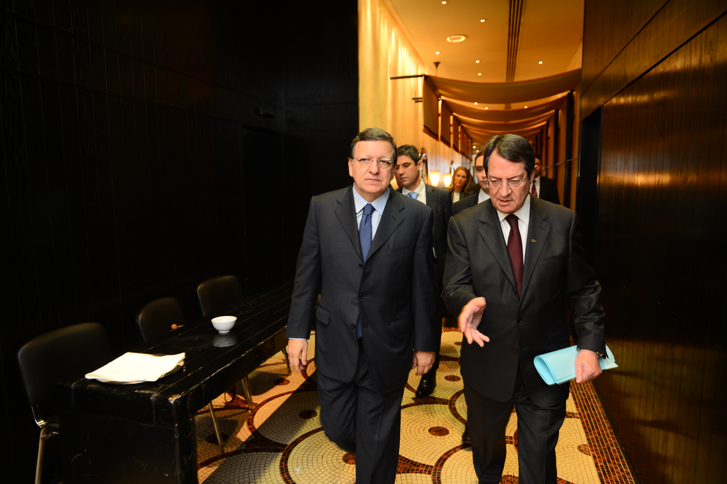 Nicos Anastasiades